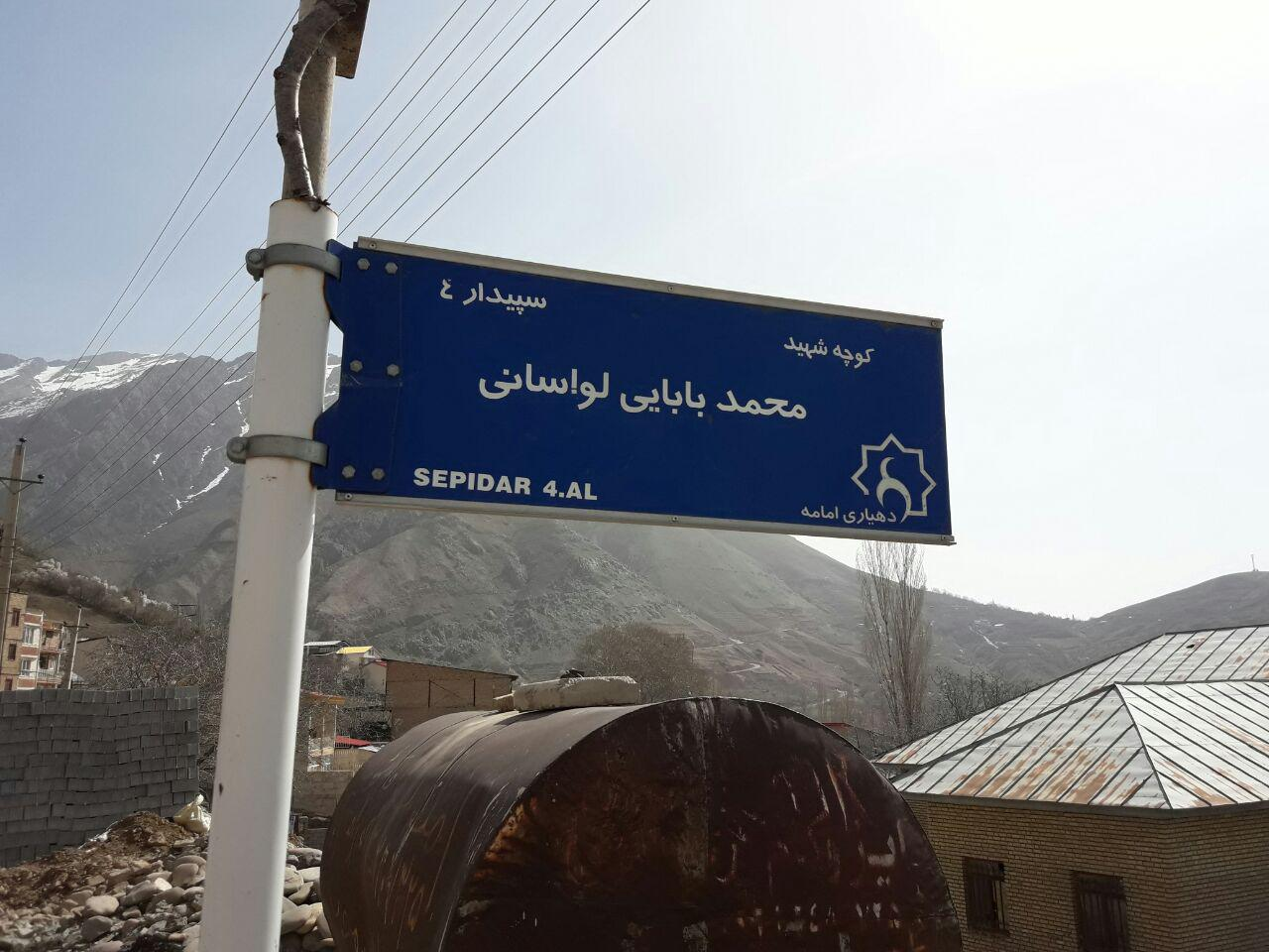 Shahid Babaei Lavasani Allay - Ammameh - Tehran province - Iran